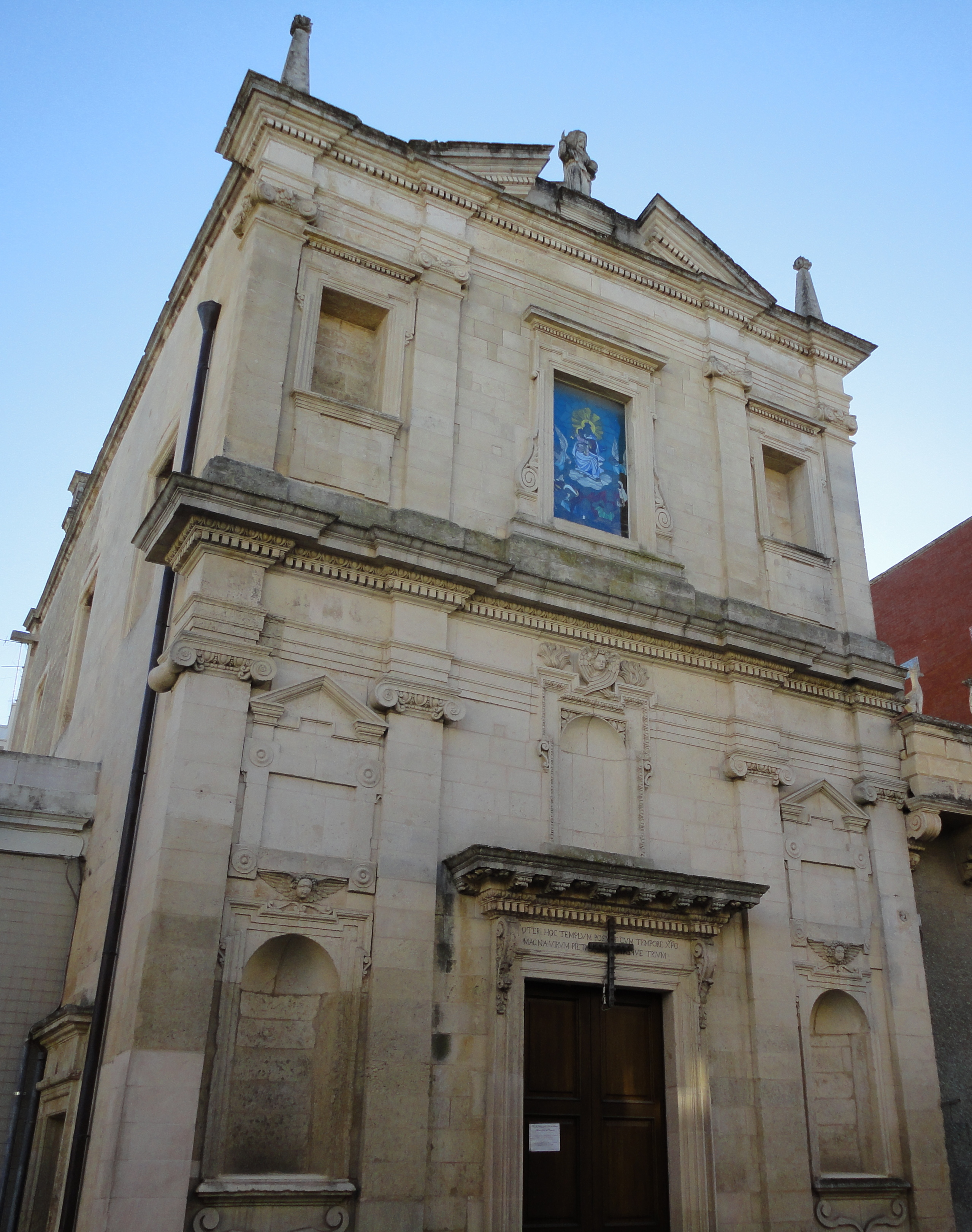 Chiesa di San Vito Surbo, Lecce